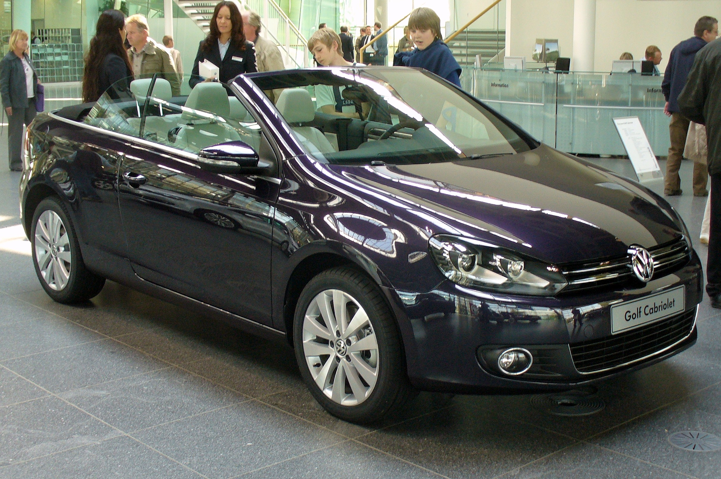 VW Golf VI Cabrio